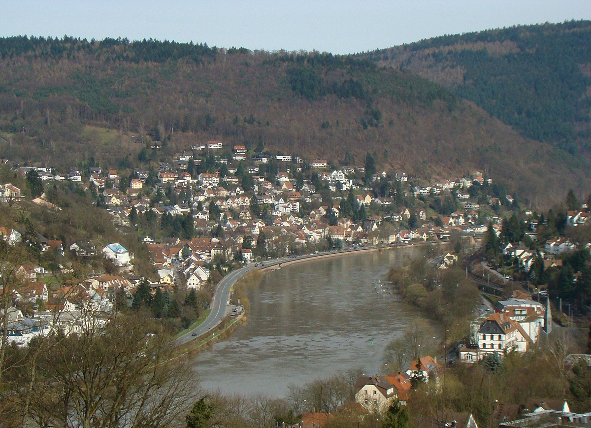 Blick von Heidelberg-Schlierbach auf Heidelberg-Ziegelhausen